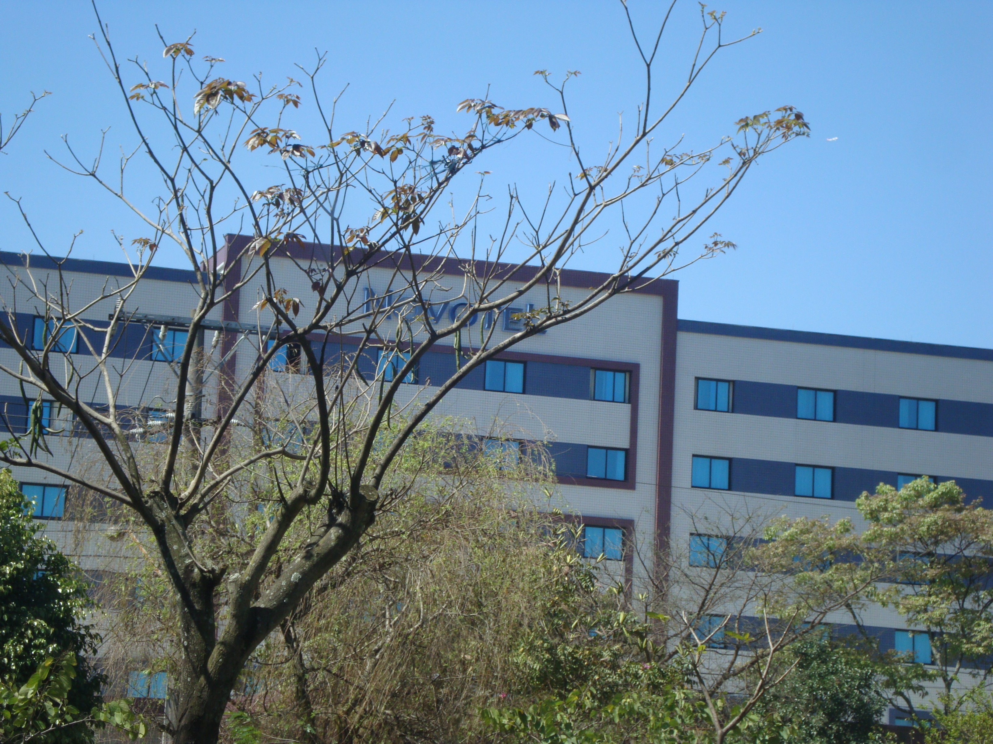 Foto do Novotel Center Norte na Vila Guilherme em São Paulo/SP